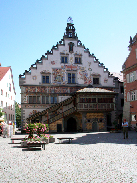 Altes Rathaus in Lindau am Bodensee